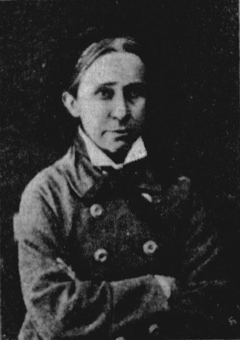 Субботина Софья Александровна - русская революционерка, народница, мать русских революционерок сестёр Субботиных.